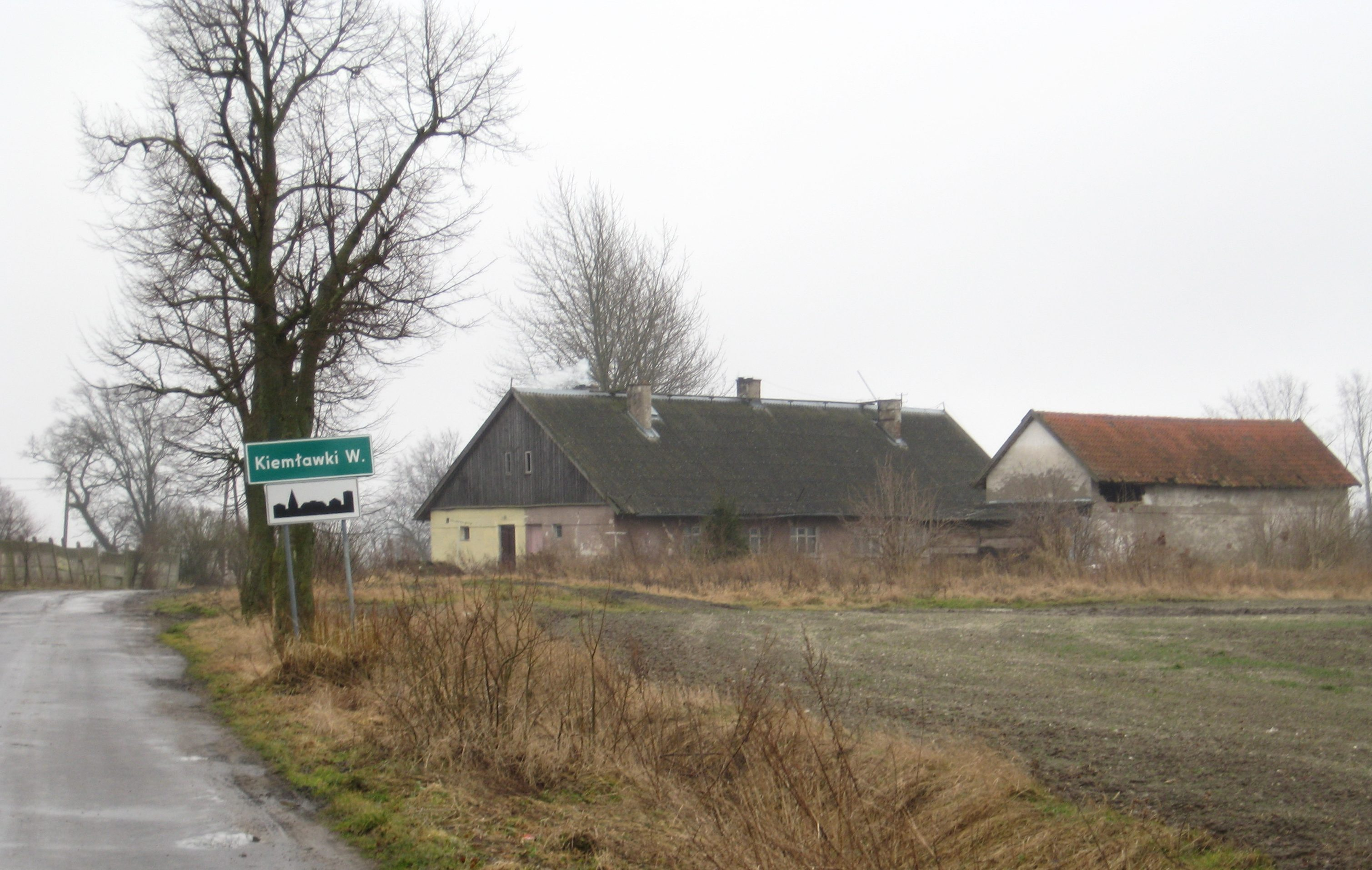 The village Kiemławki Wielkie in Poland - OpenStreetMap (Info)